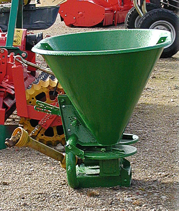 Eine kleine Düngerschleuder